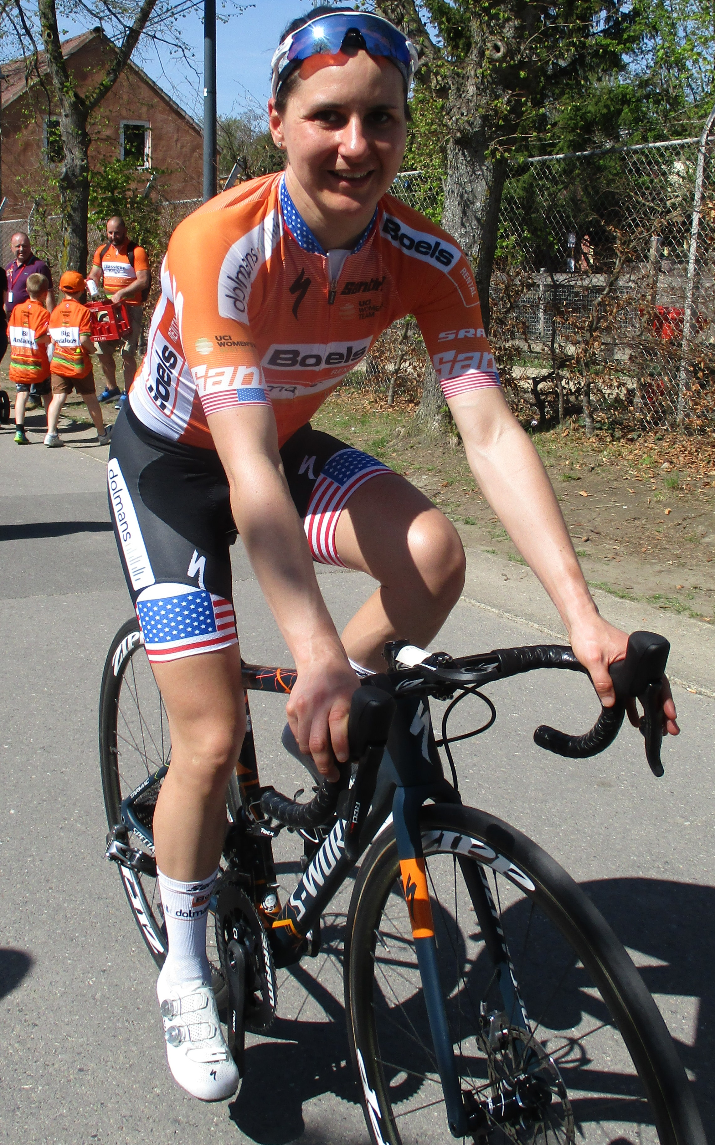 Na de finish van de Waalse Pijl 2018 op de Mur van Huy.